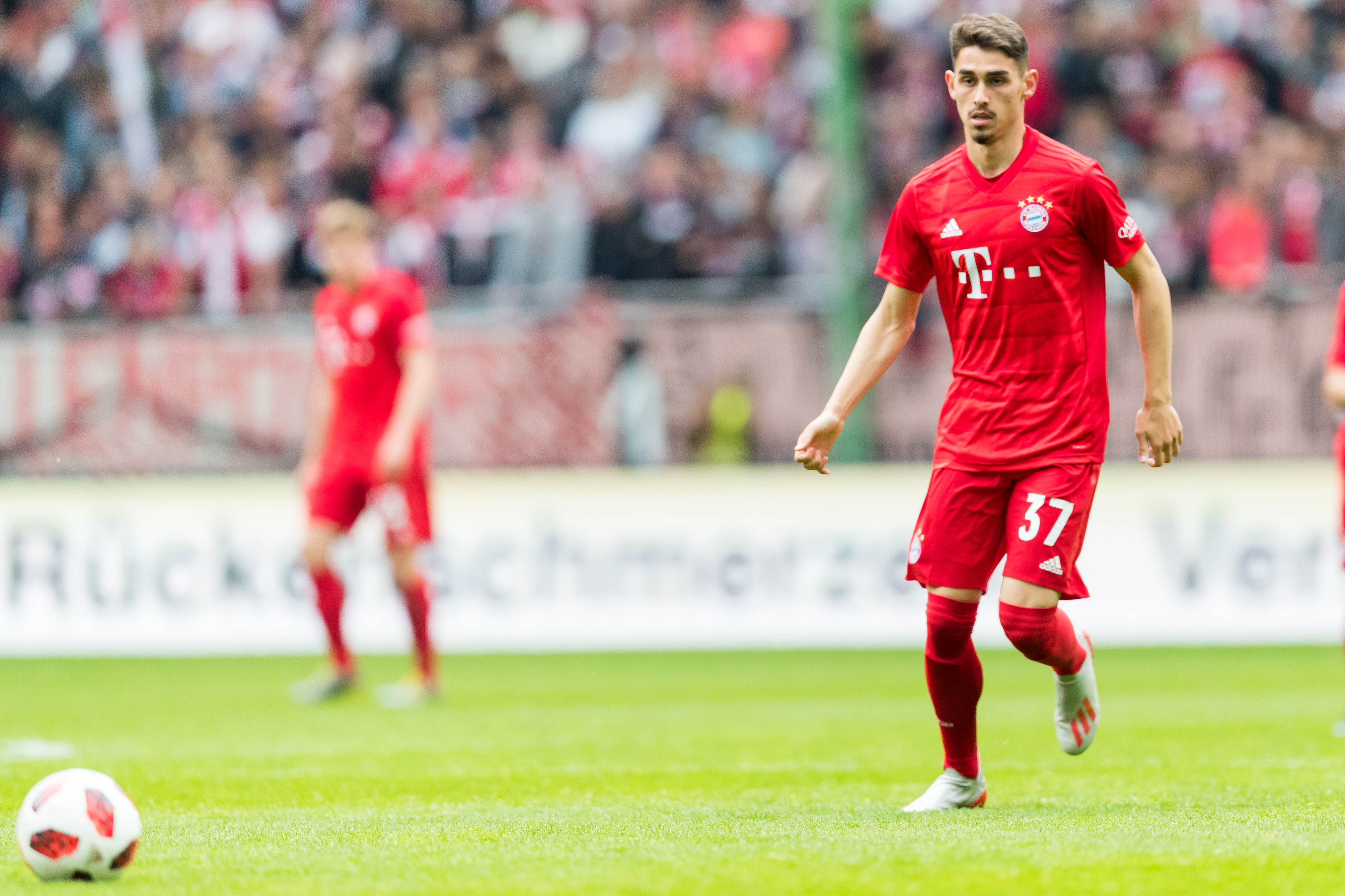 during 1.FC Kaiserslautern vs FC Bayern München at Fritz-Walter-Stadion, Kaiserslautern, Rheinland-Pfalz, Germany on 2019-05-27, Photo: Sven Mandel